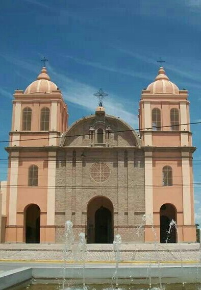 Catedral Nuestra Sra del Carmen - Cruz del Eje